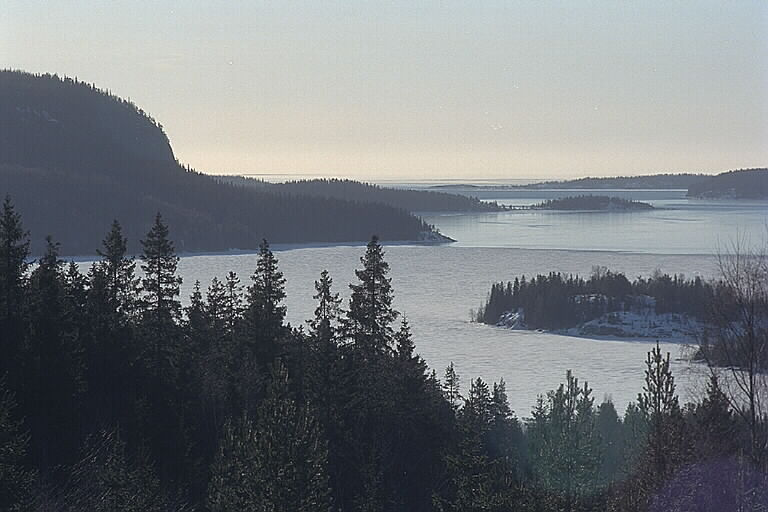 Mot SÖ ut mot fjärden. Ingår i Höga kusten världsarvsområde. Motiv: Gaviksfjärden Nyckelord: Vintermotiv, Världsarv Kategori: Insjömiljöer Mot SÖ ut mot fjärden. Ingår i Höga kusten världsarvsområde.